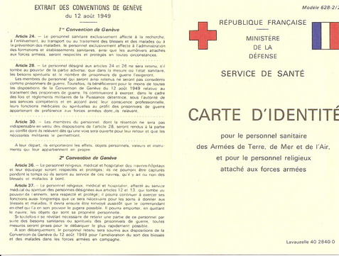 Extérieur d'une carte d'identité sanitaire, éditée par l'armée française, conforme au modèle établi les conventions de Genève.